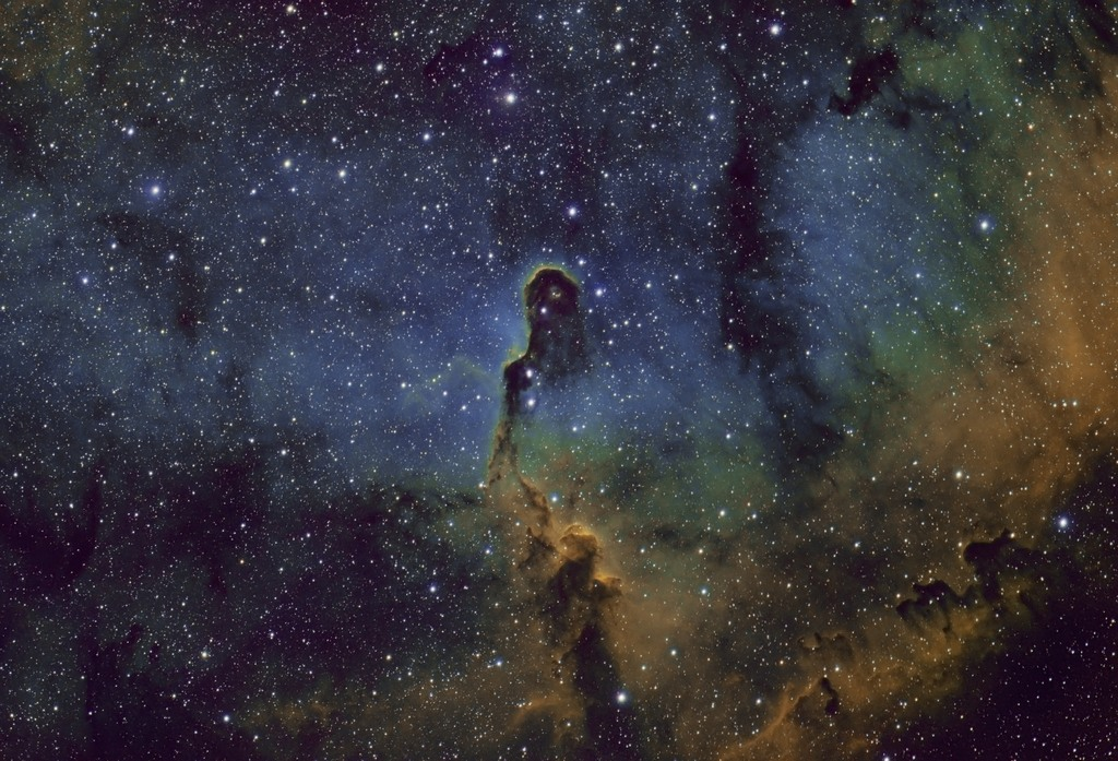 Elephant trunk Nebula captured in narrowband with Hydrogen alpha, Oxygen III and sulfur II. Captured on 102mm telescopes, 4 minute exposures for a total of 7 hours.